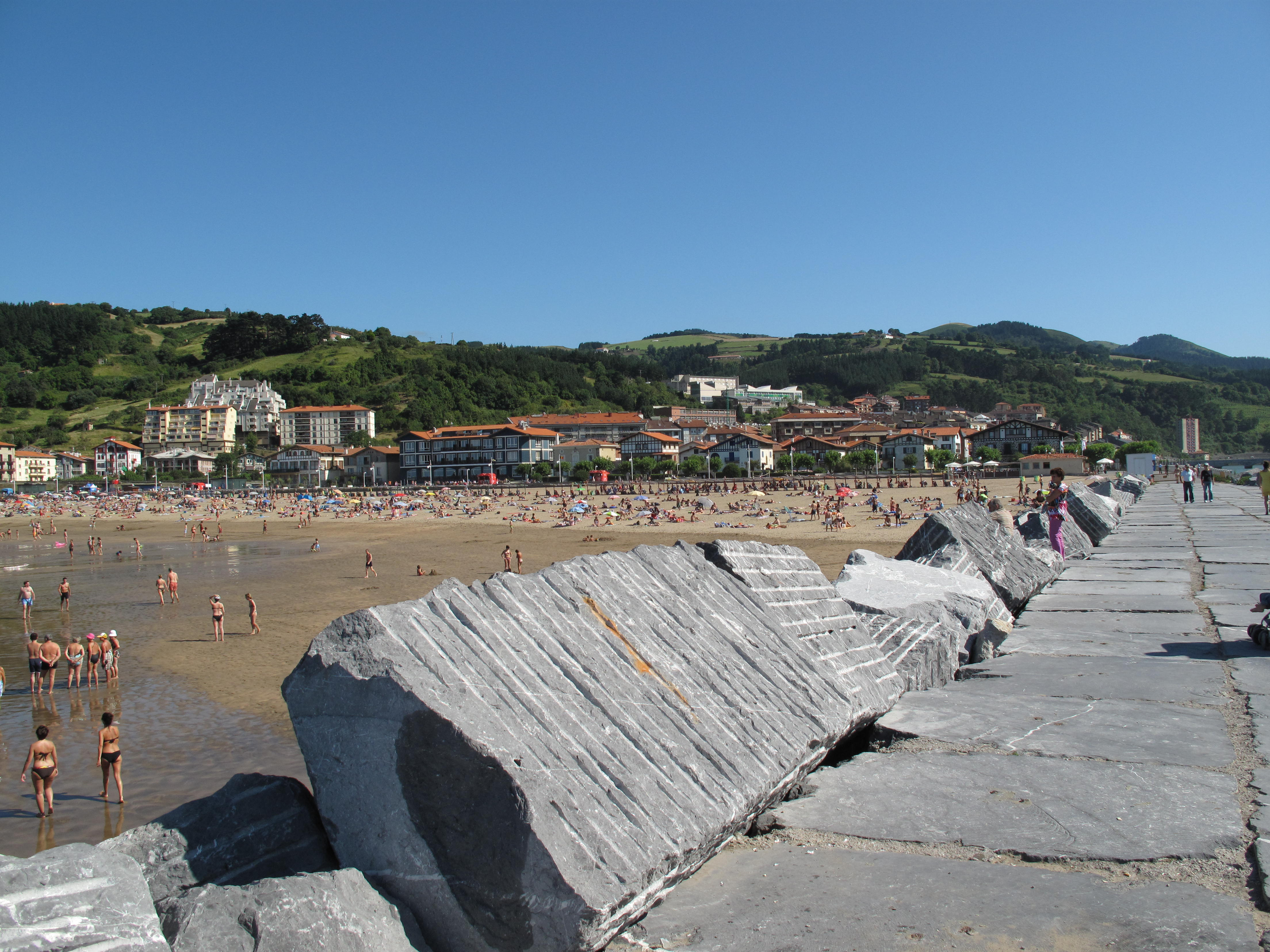 Playa de Deba (Guipuzcoa).